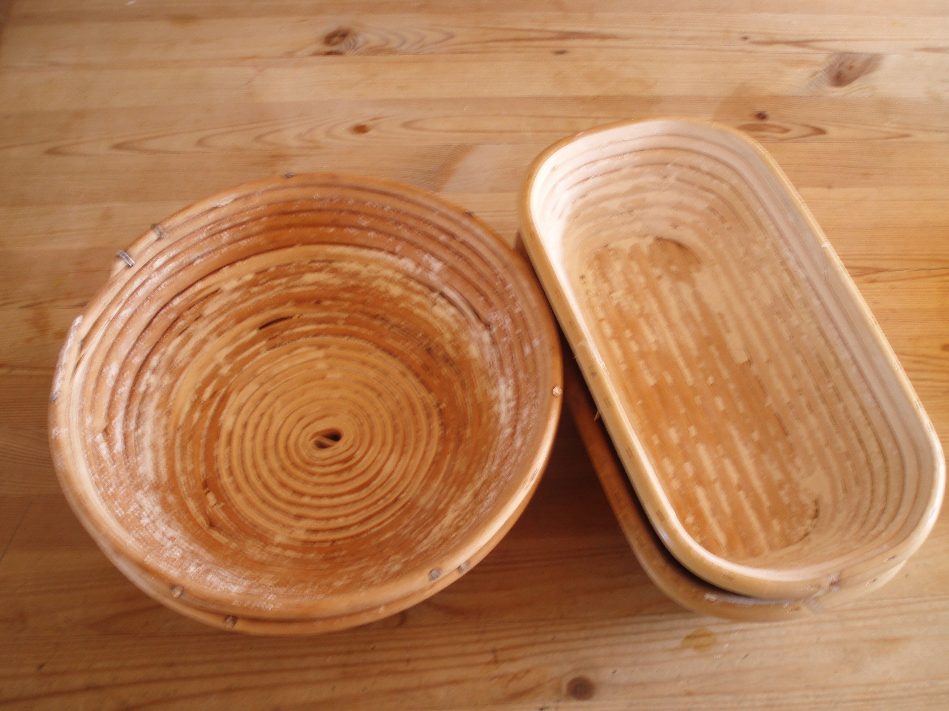 Jäskorgar